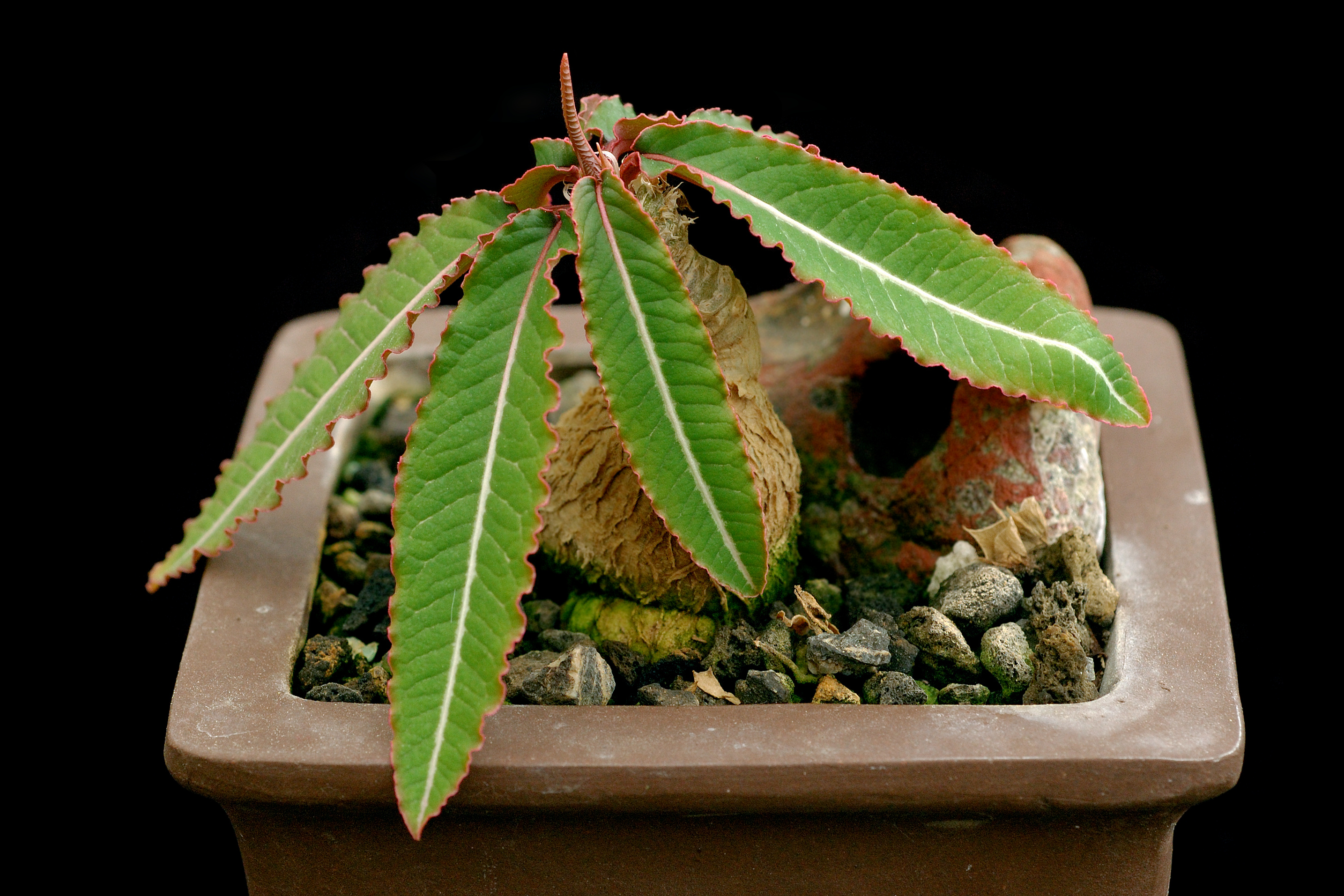 Euphorbia labatii